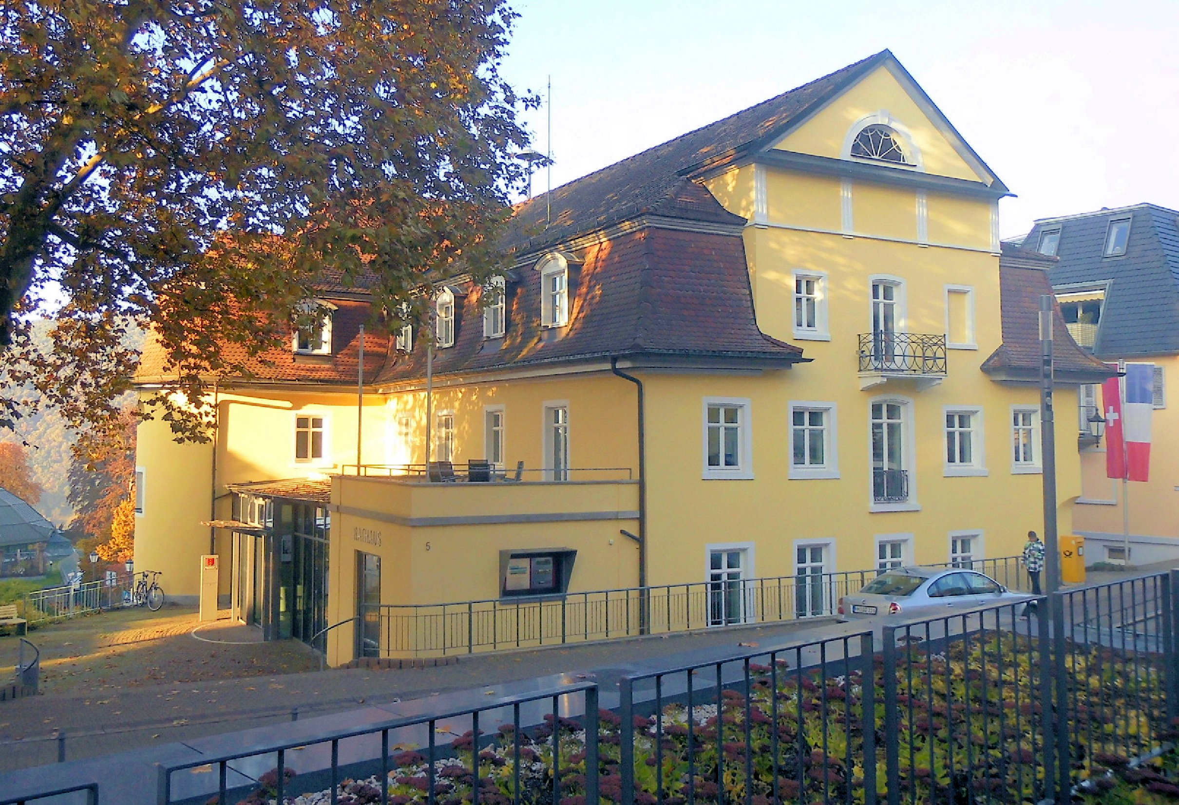 Rathaus der Gemeinde Badenweiler, Baden